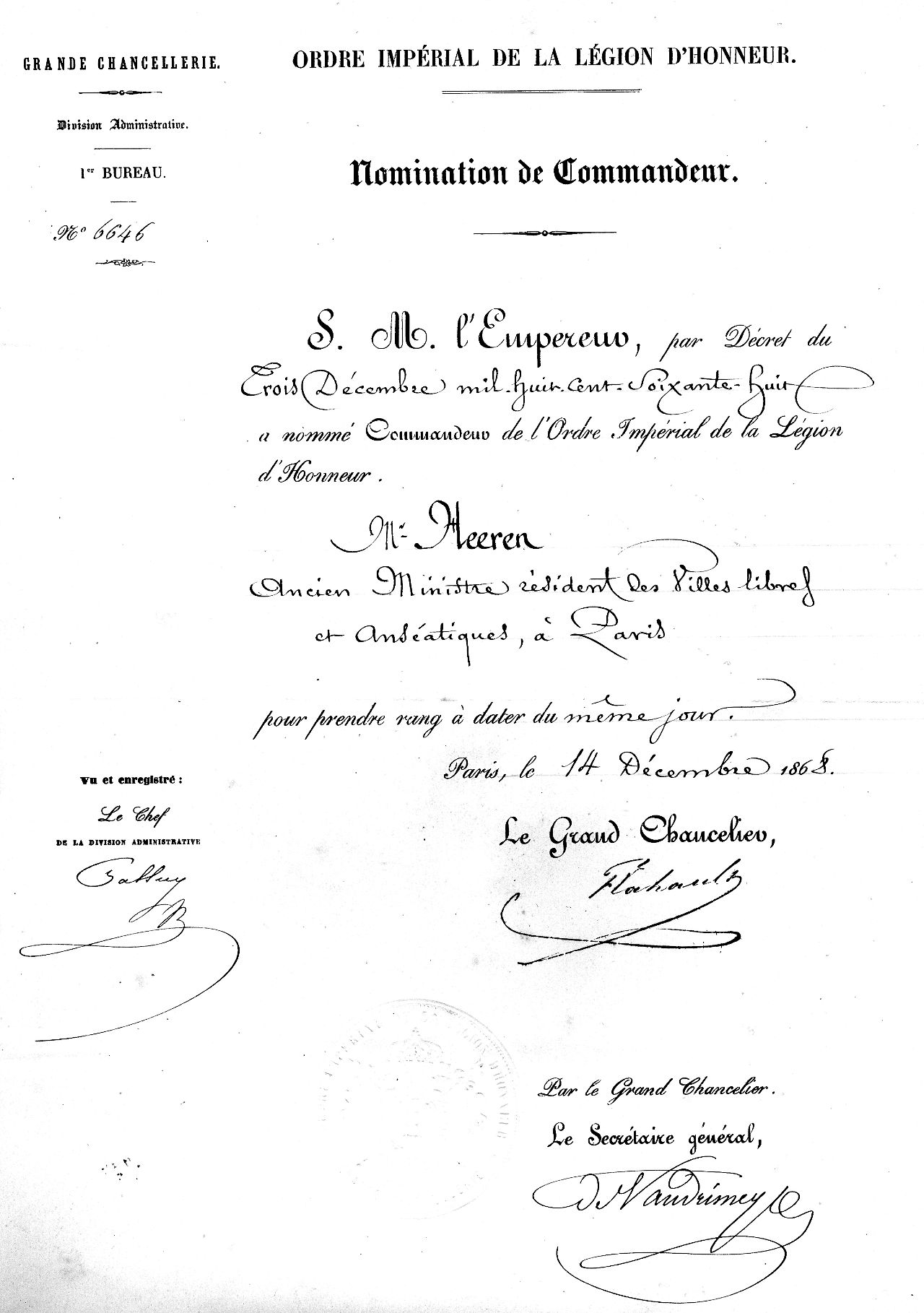 Ernennnungsurkunde zum Kommandeur der Ehrenlegion in Paris für Hermann von Heeren